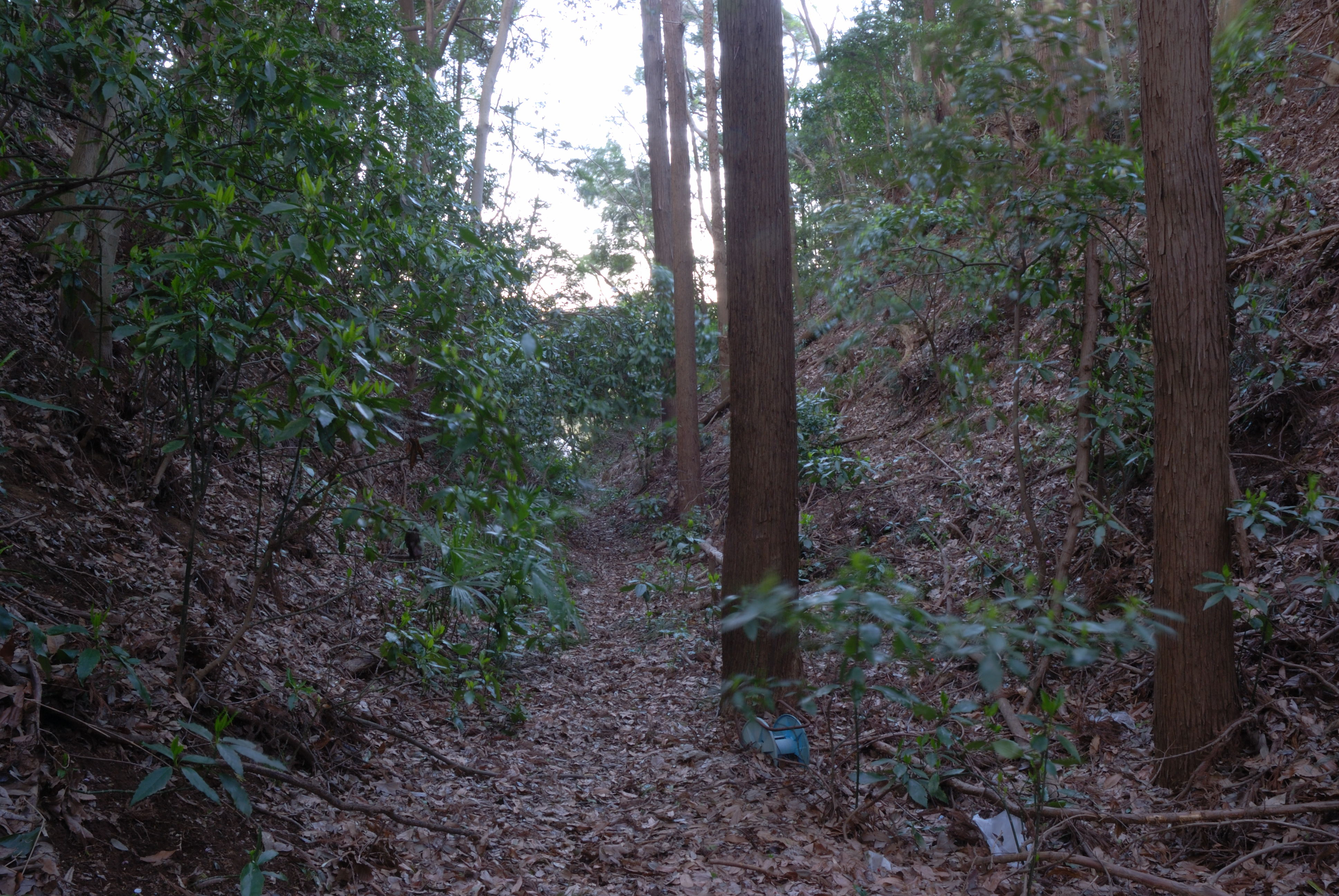 Sankaku karabori